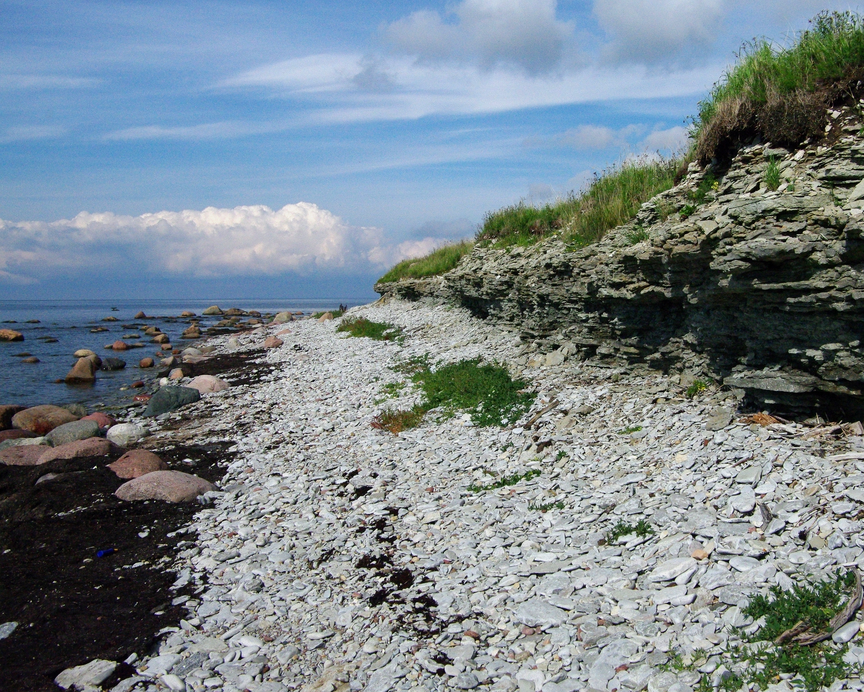 Ohessaare pank Saaremaal